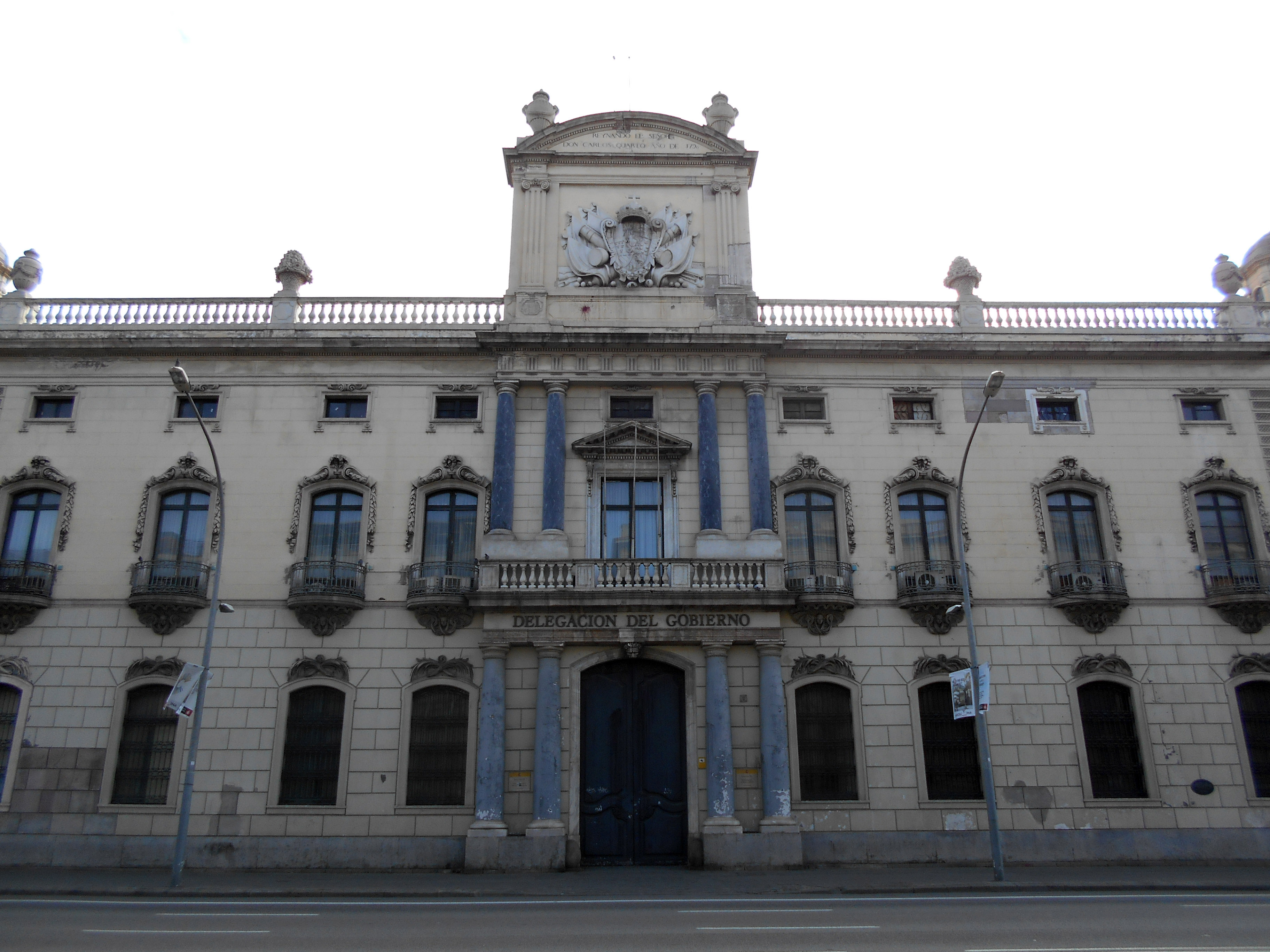 Aduana (1790-1792), de Juan Miguel de Roncali.